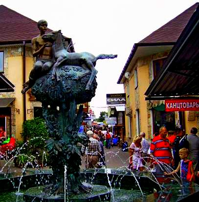 Памятник юному натуралисту